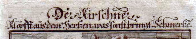 Furrier / Kürschner. Ausschnitt des Titelbilds, den Abschnitt Die Kürschner betreffend. Zu diesen Bildern schrieb der Wiener Hofprediger Peter Abraham à Santa Clara (1644-1709), der besonders von Schiller und Goethe hochgeschätzt war, für die einzelnen Gewerbe geeignete Sechszeiler. Der Kirschner klopfft aus dem Hertzen, was sonst bingt Schmertzen. Ein Fuchs sprangt in dem Fuchsbalg offt, mit Schmach, für Ehre bey den Frommen: Der Schmuck, den man vom Marder hofft, ist von dem Todten Aaß genommen, Das Lamm, für uns am Kreutz geschlachtet, gibt Zier, die man so wenig achtet.